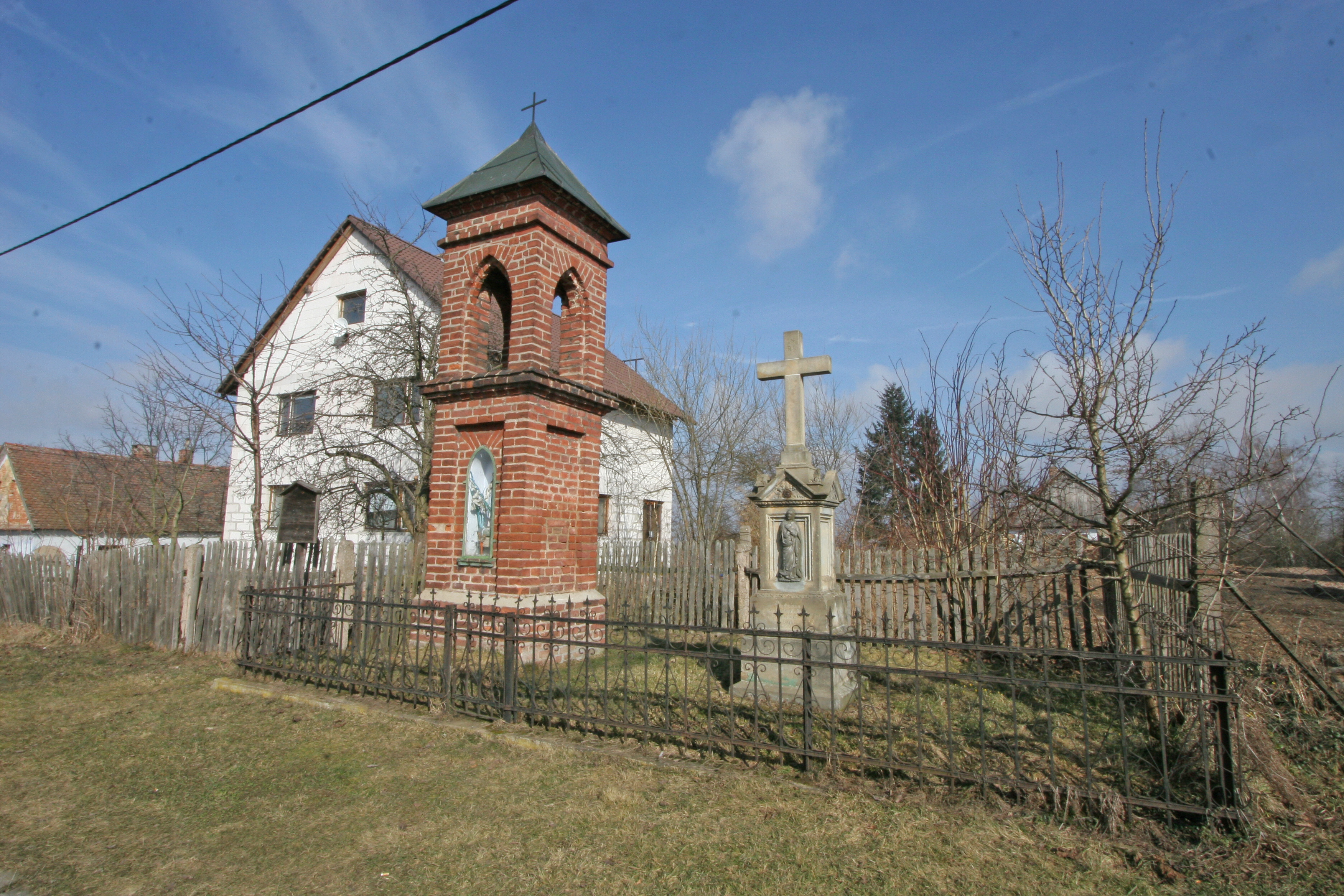 Česky: Trávník zvonička